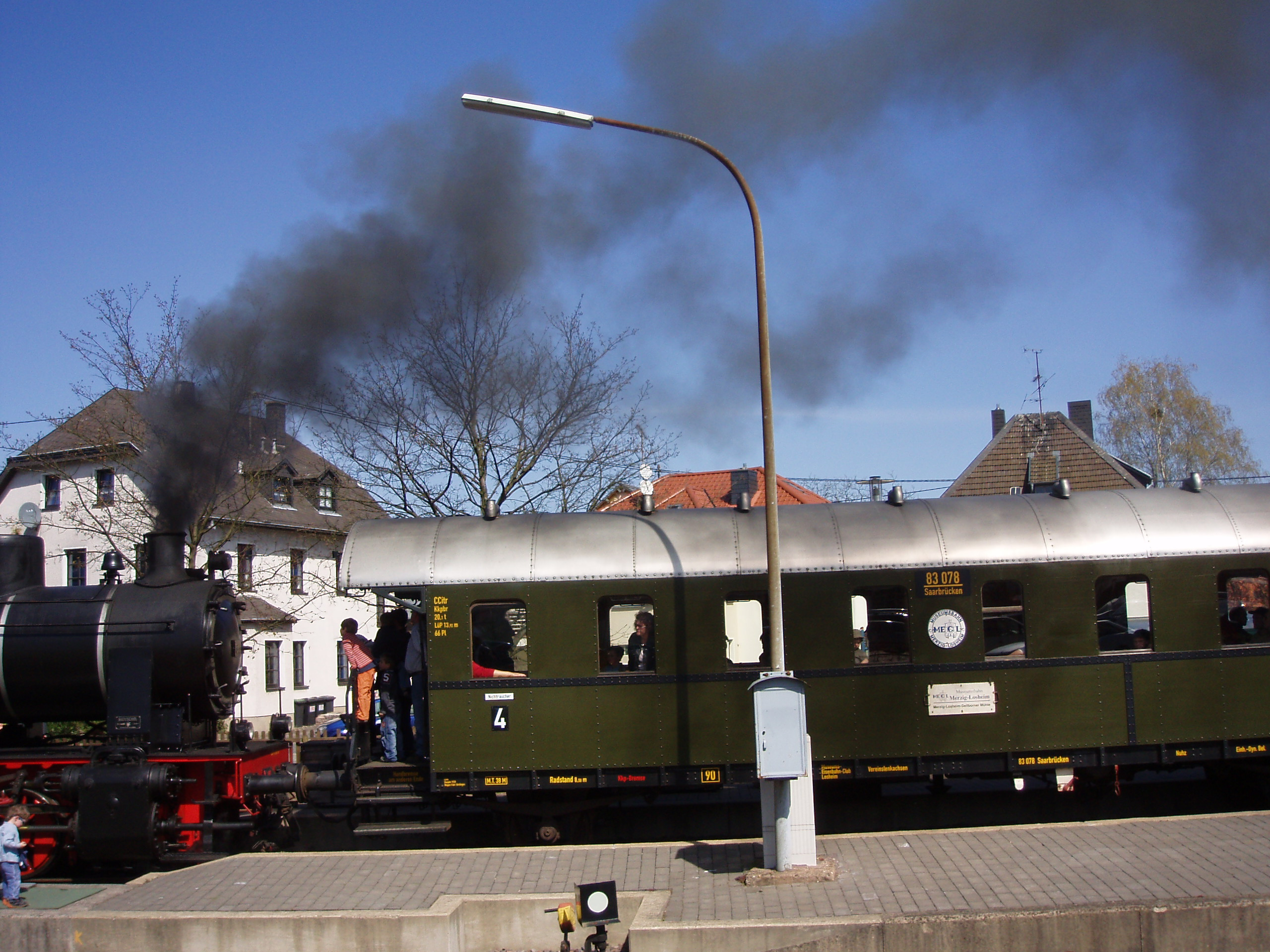 Museumszug in Losheim